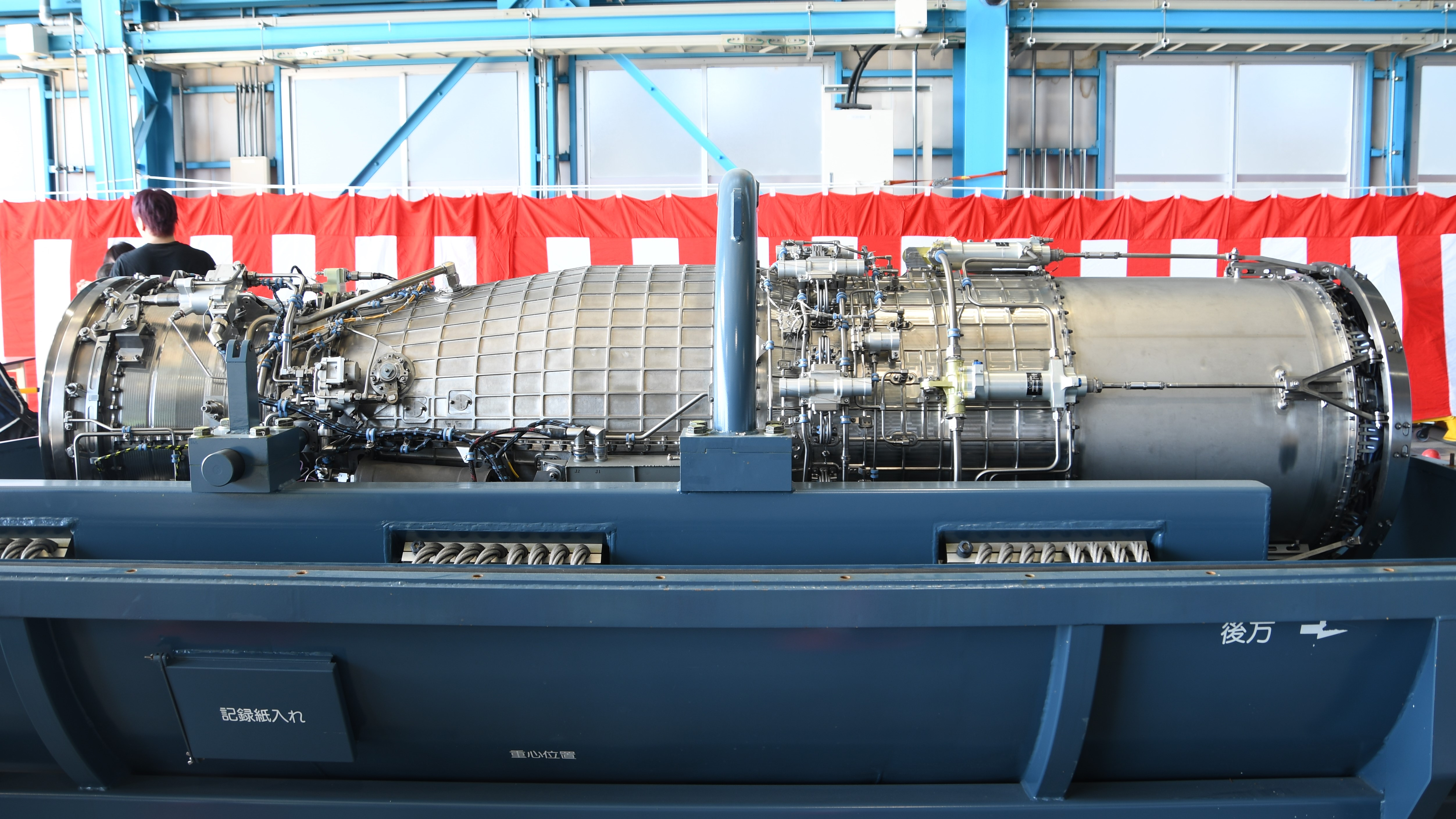 石川島播磨重工業（現：IHI） XF5-1ターボファン・エンジン 右側面。2019年11月10日 航空自衛隊岐阜基地にて。